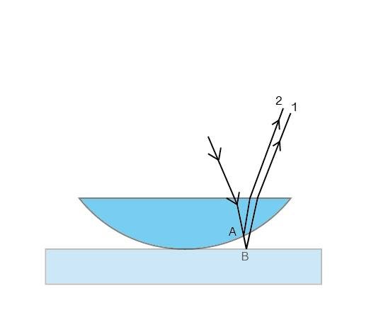 lente plano convexa2